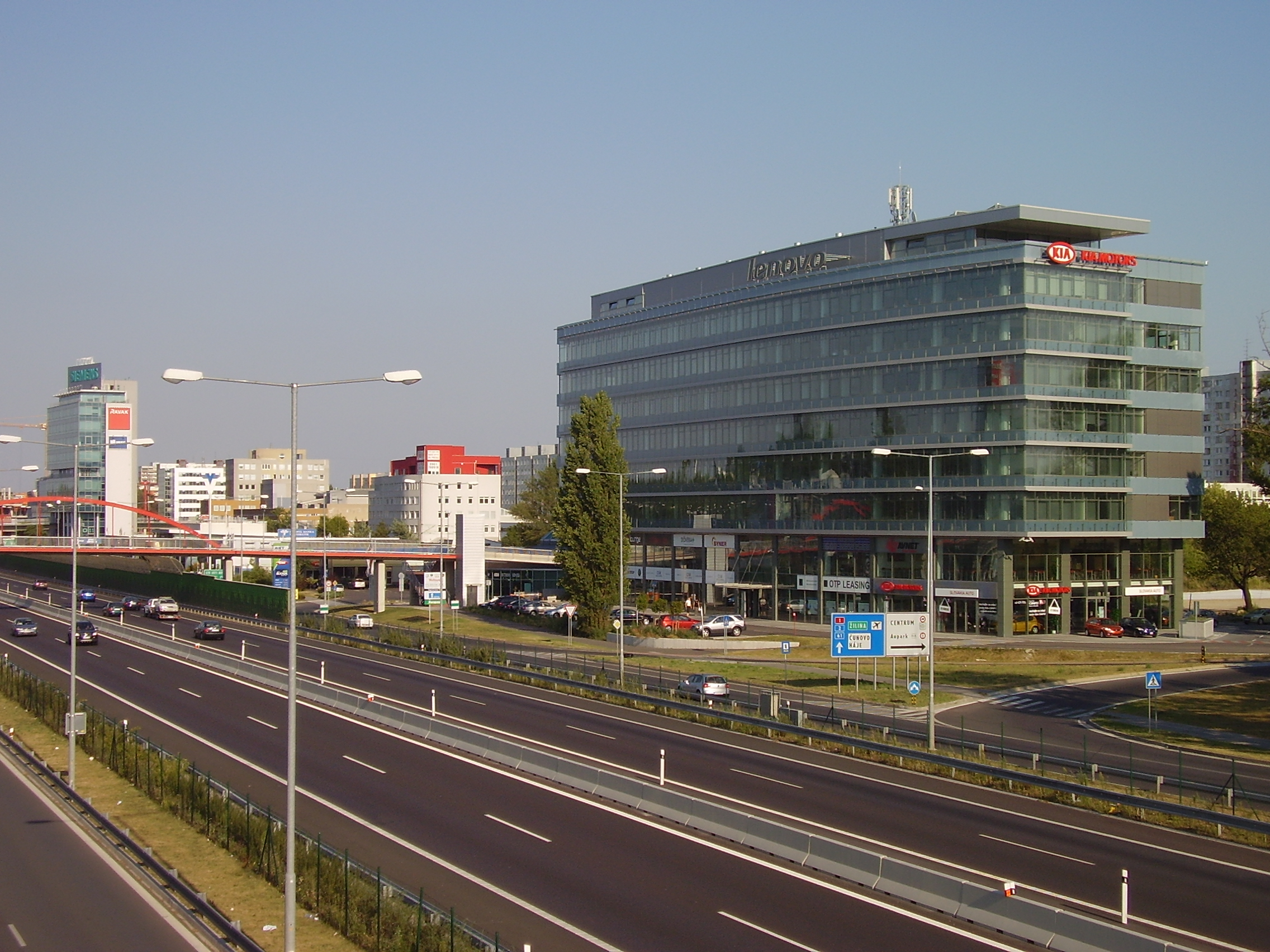 Bratislava